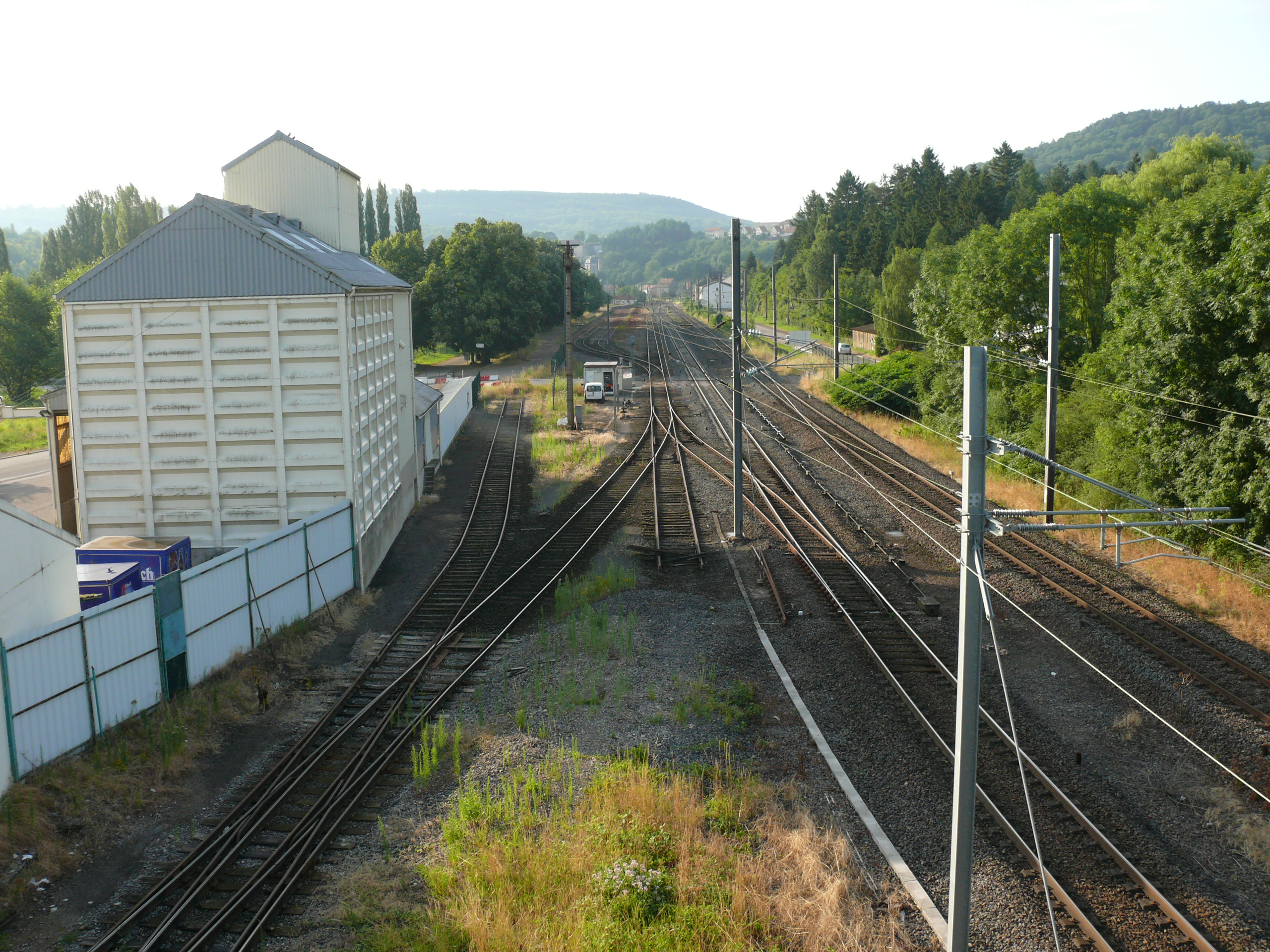 Arrière gare de Sierck-les-Bains à Rettel